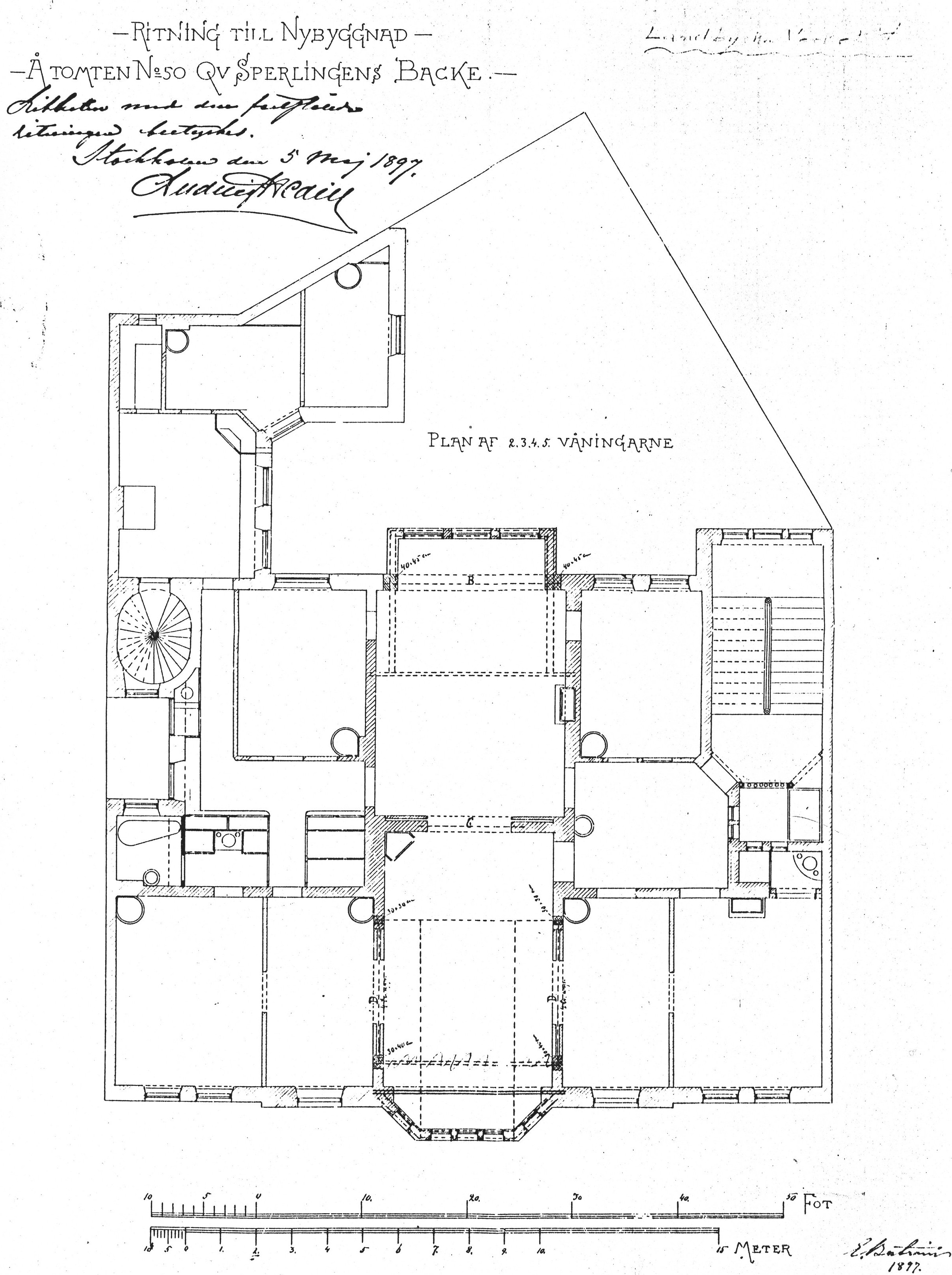 Birger Jarlsgatan 26, planritning, vån. 1-4 tr